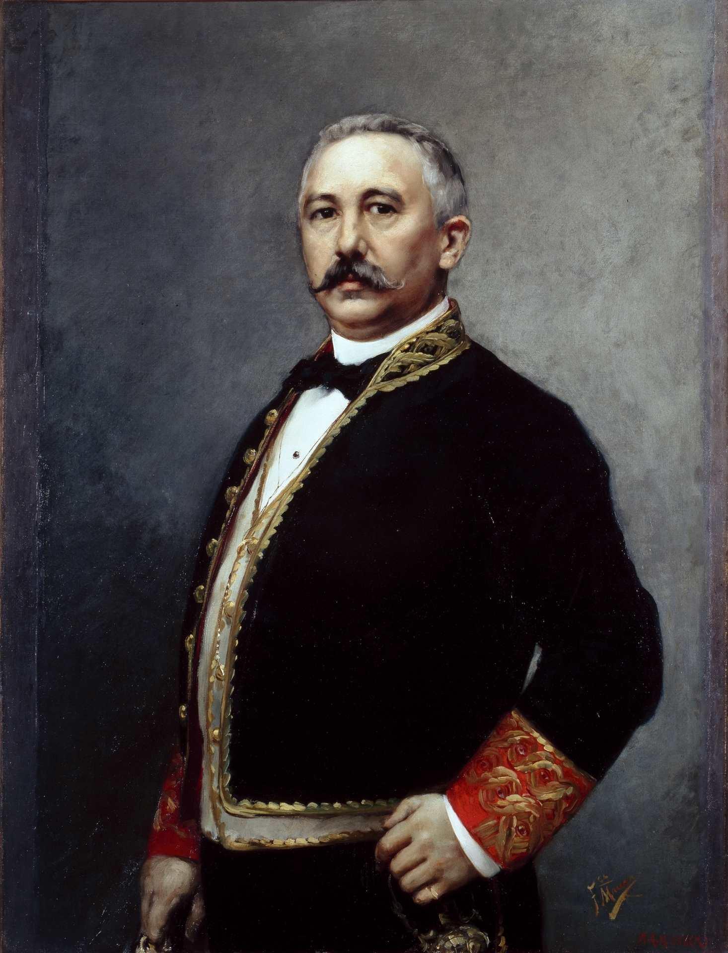 Retrato del político español Germán Gamazo (1840-1901), que llegó a ser ministro de varias carteras en diferentes gobiernos de España a lo largo del siglo XIX.